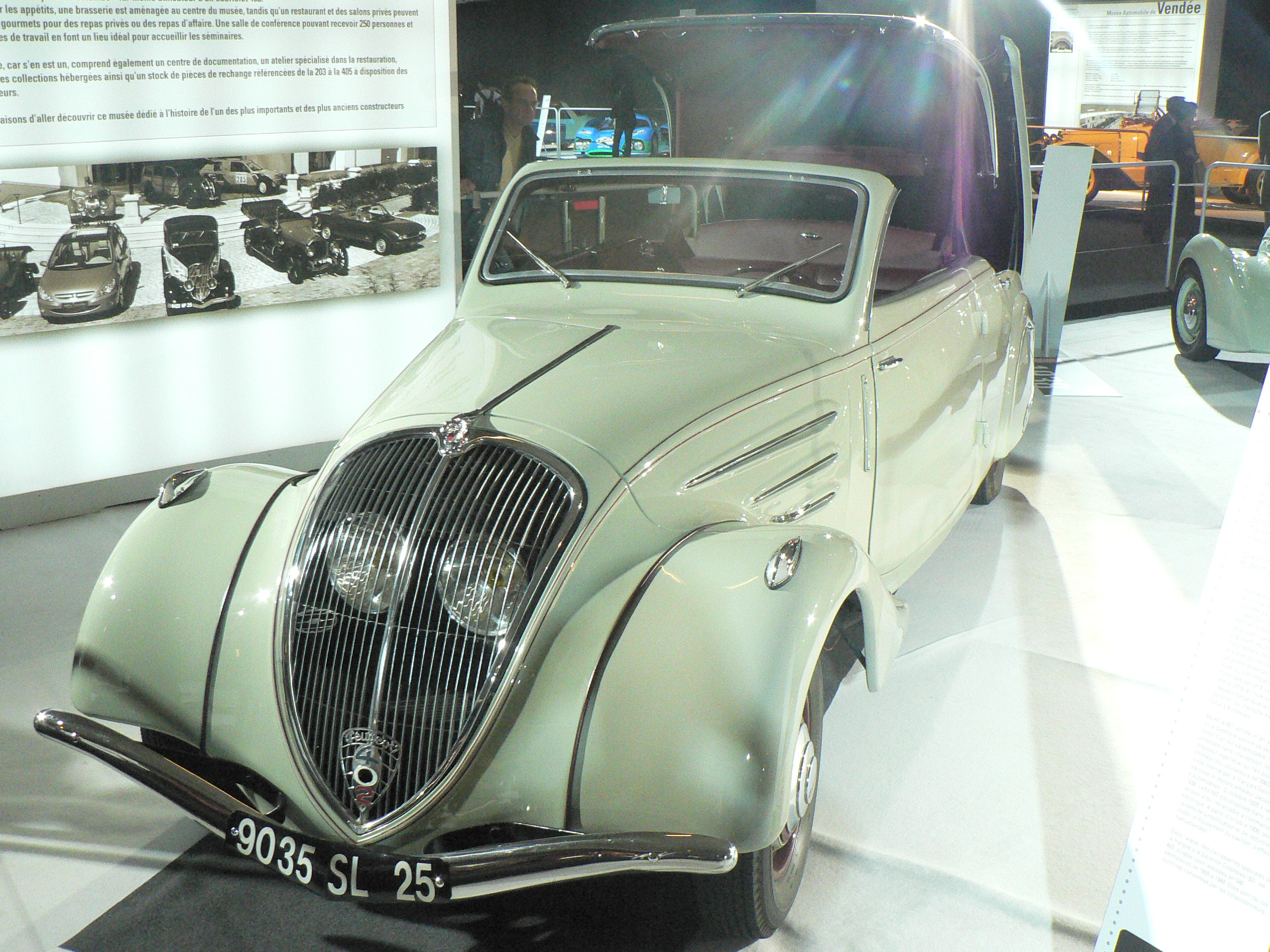 Mondial de l automobile de Paris (October 2006)